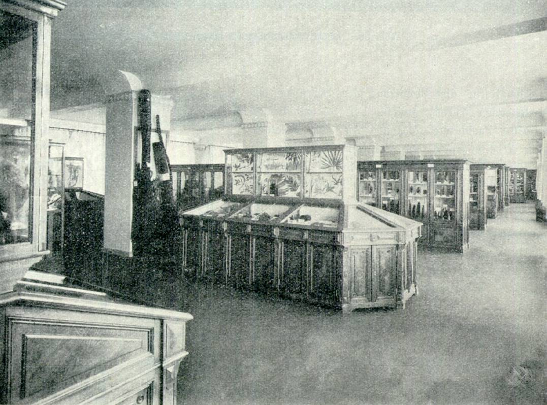 Berlin, Botanisches Museum